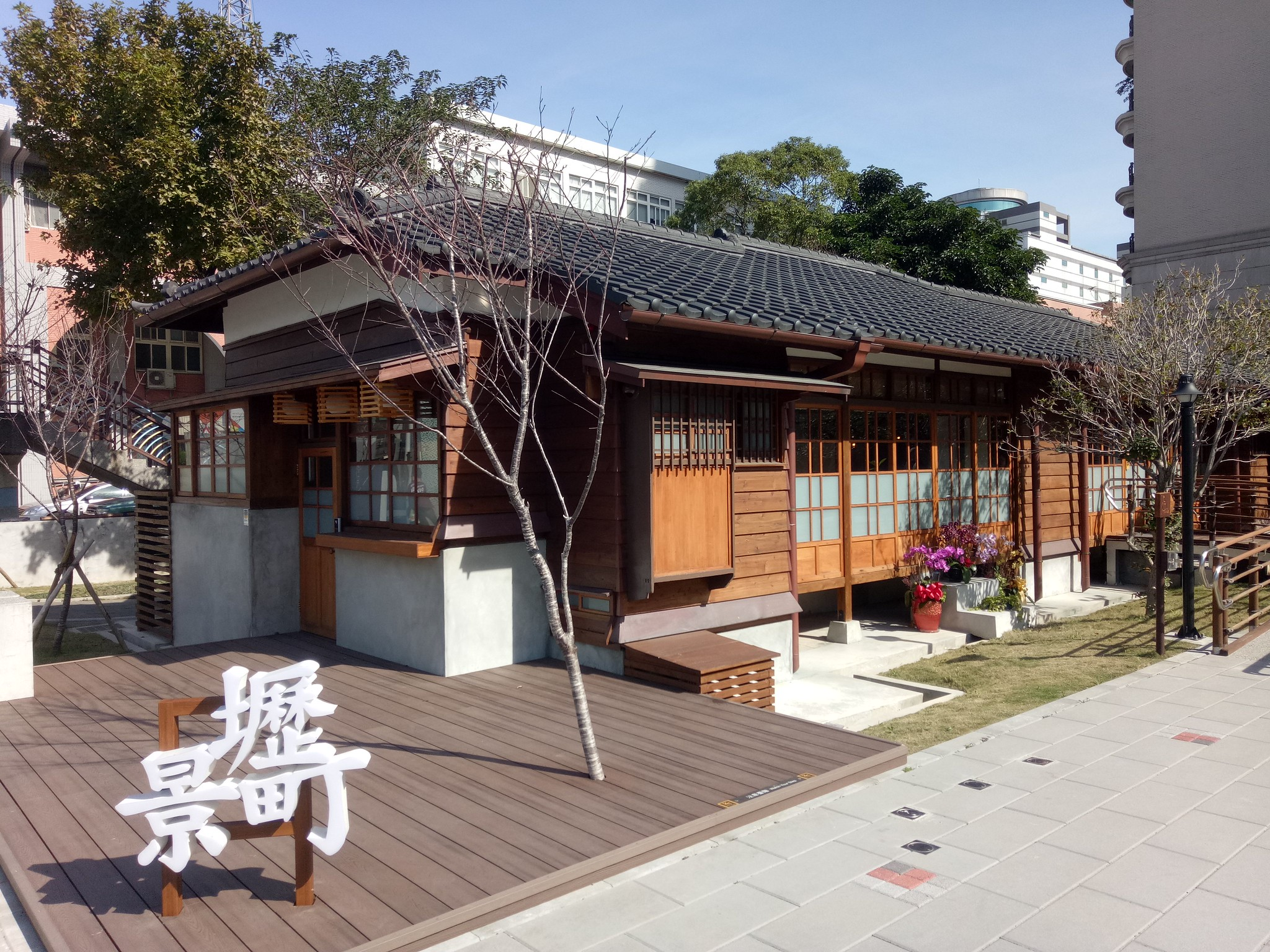 壢景町位於臺灣桃園市中壢區，前身為臺灣日治時期中壢郡役所官舍，建於1941年；戰後則改為中壢警察分局宿舍。2013年公告登錄為桃園市歷史建築，桃園市政府文化局進行修復工程，由民眾投票命名為「壢景町」15日開館營運。